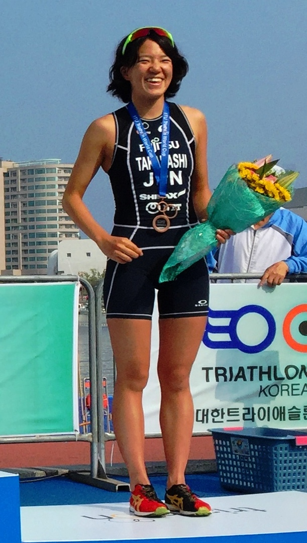 Jolanda Annen (CHE), Yuka Sato (JPN) und Yuko Takahashi (JPN) am Triathlon Weltcup Tongyeong 2015